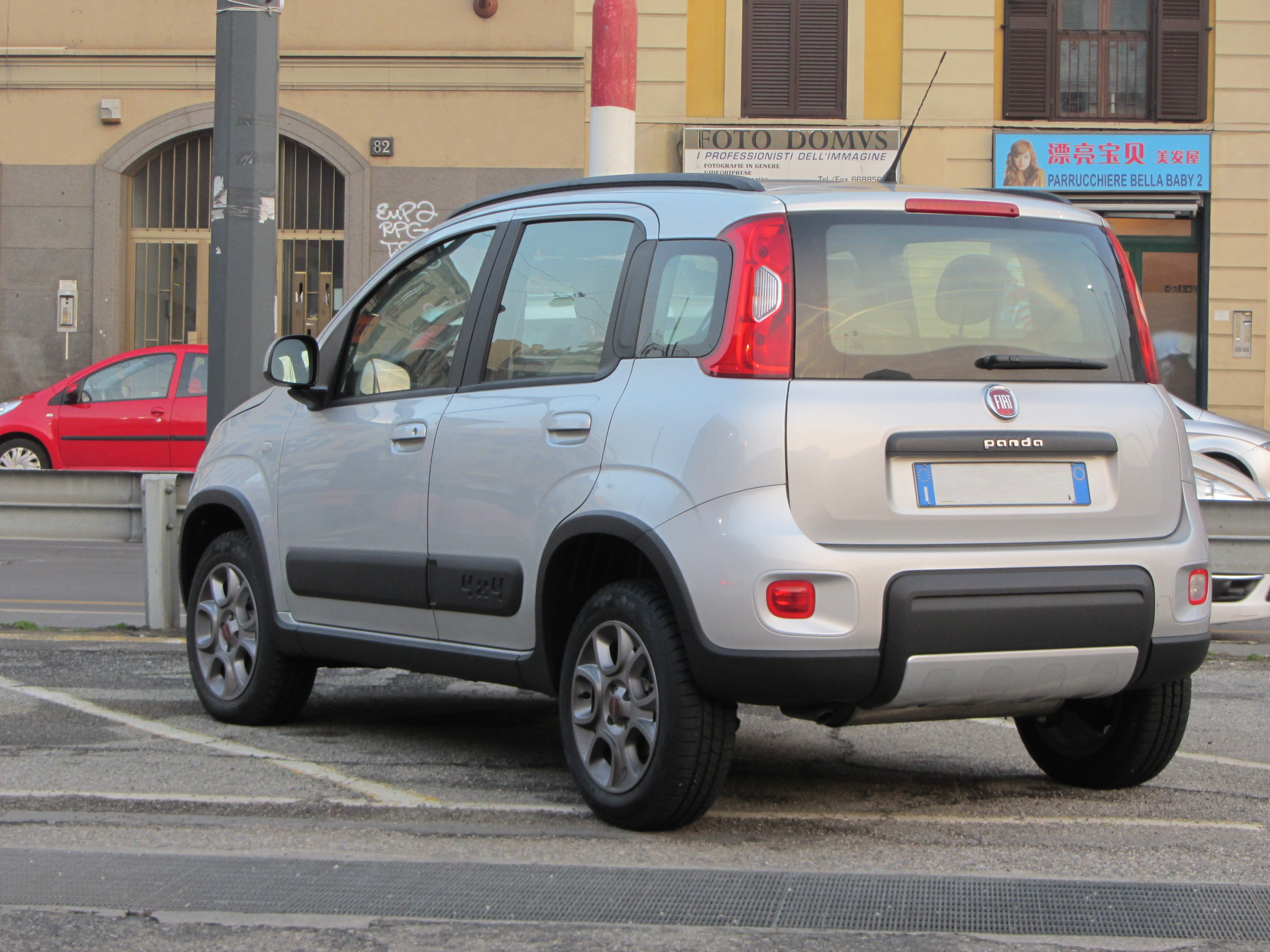 Una Fiat Panda terza serie (MK3 - 2011) 4x4 a Milano